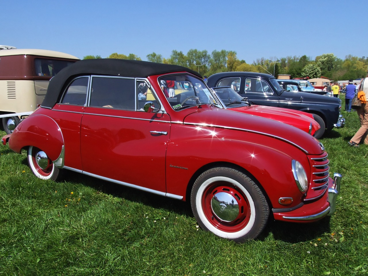 Quelle: selbst fotografiert, 04/2007 Fotograf: Späth Chr.